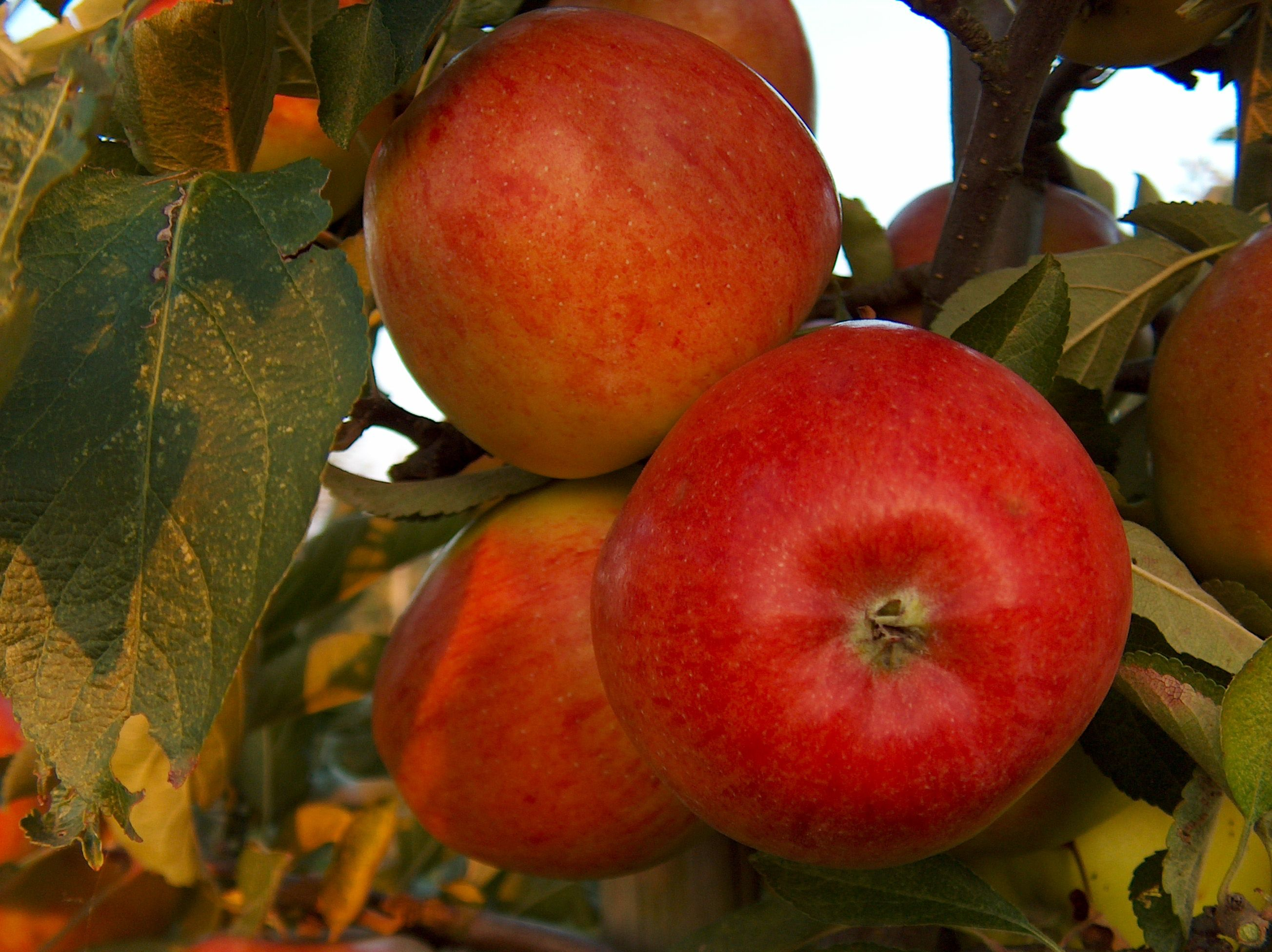 Äpfel der Sorte Braeburn am Baum